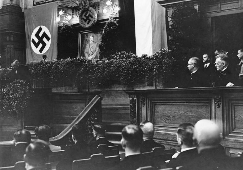 Die erste feierliche Sitzung des Volksgerichts im großen Sitzungssaal des Preußenhauses in Berlin! Reichsjustizminister Dr. Gürtner eröffnet in feierlicher Ansprache die erste Sitzung des Volksgerichtshofes im Preußenhaus in Berlin. Links im Bilde Senatspräsident Dr. Fritz Rehn und Senatspräsident Dr. Wilhelm Burger